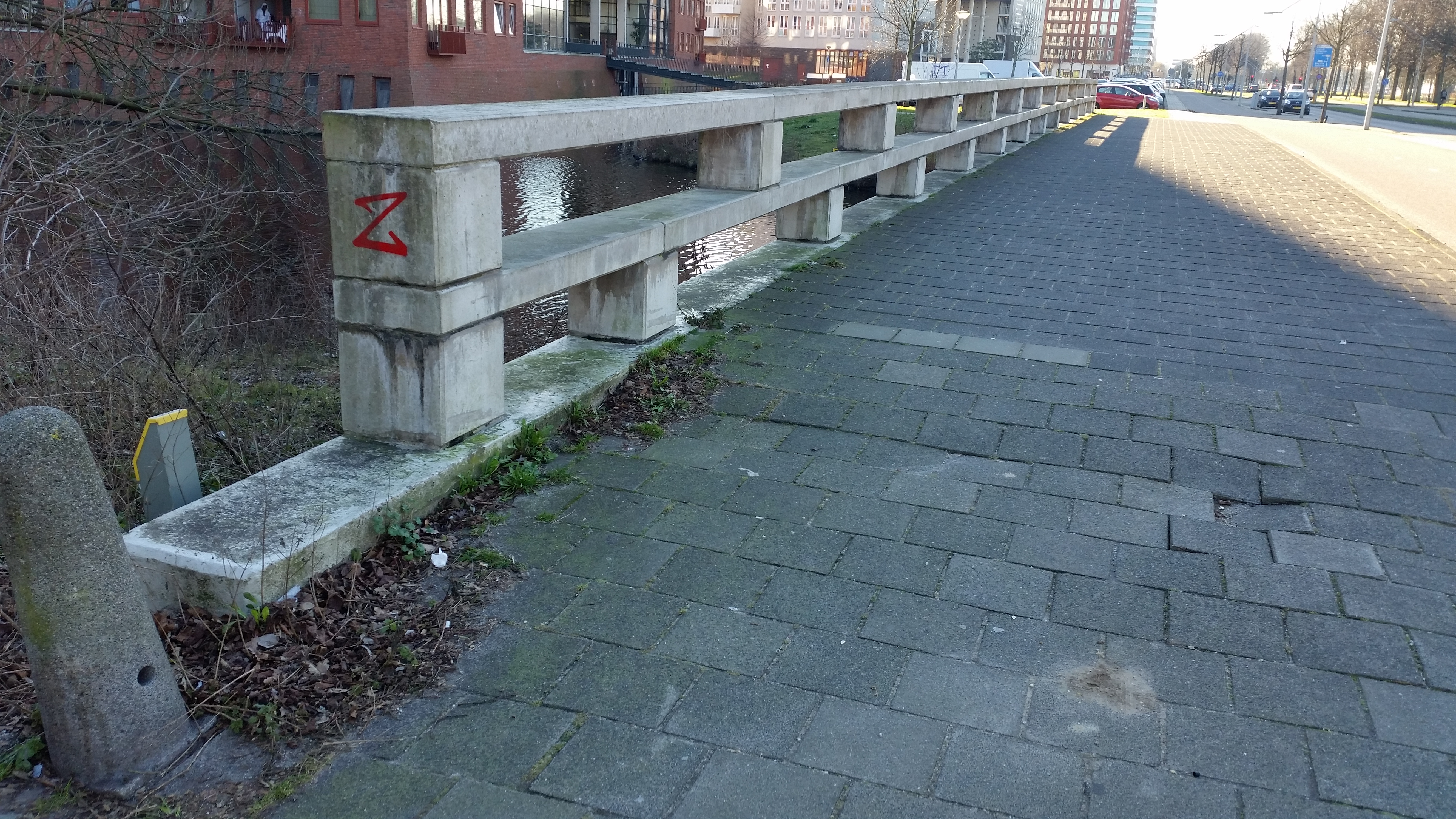 Leuning van Brug 751 (in Amsterdam)